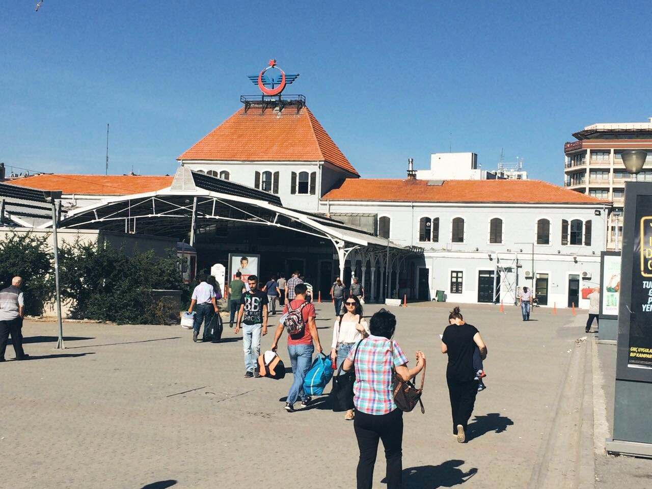 İçeriden Görüntüsü